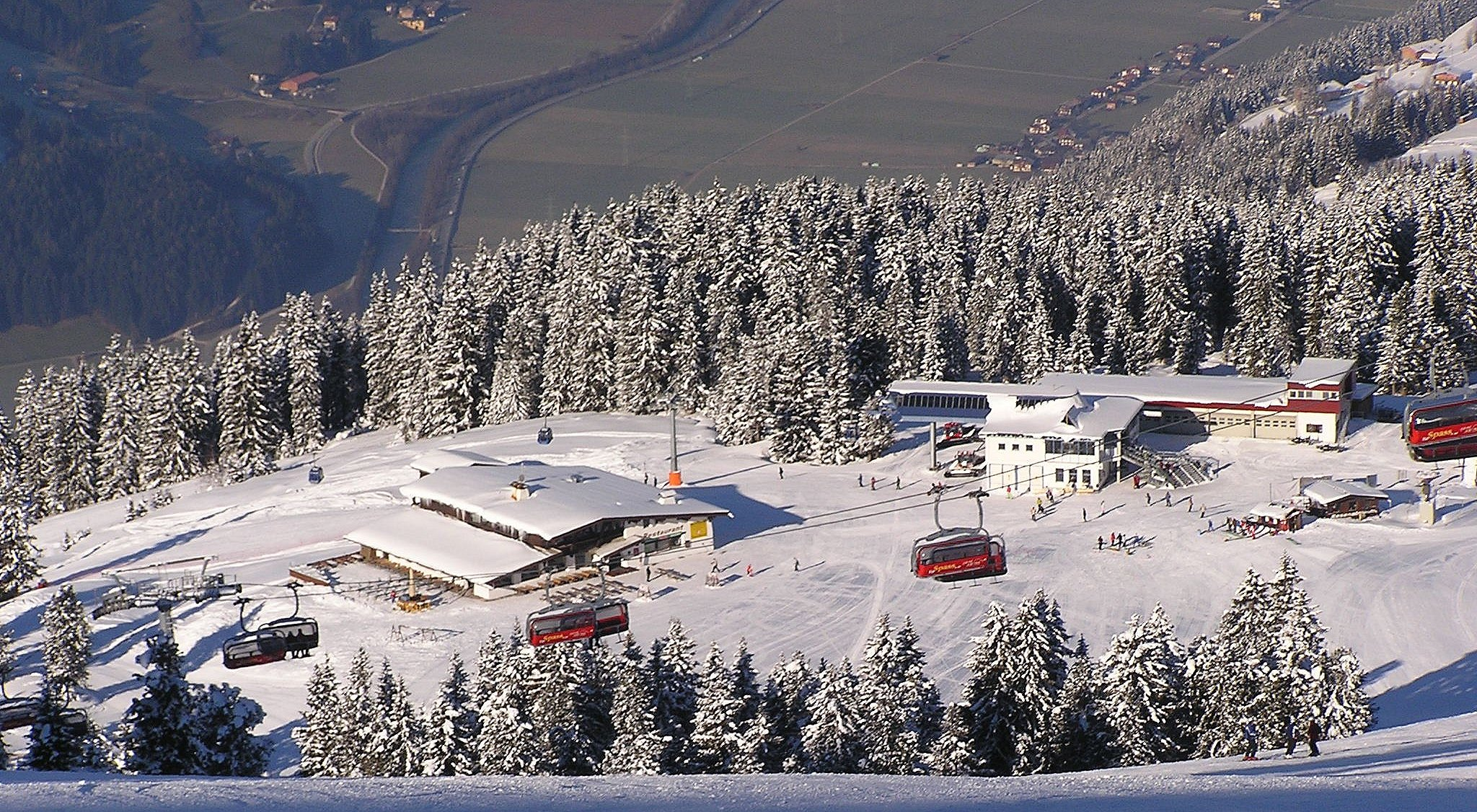 Im Schigebiet der Zillertal-Arena, mit Blick auf die Bergstation bei der Rosenalm